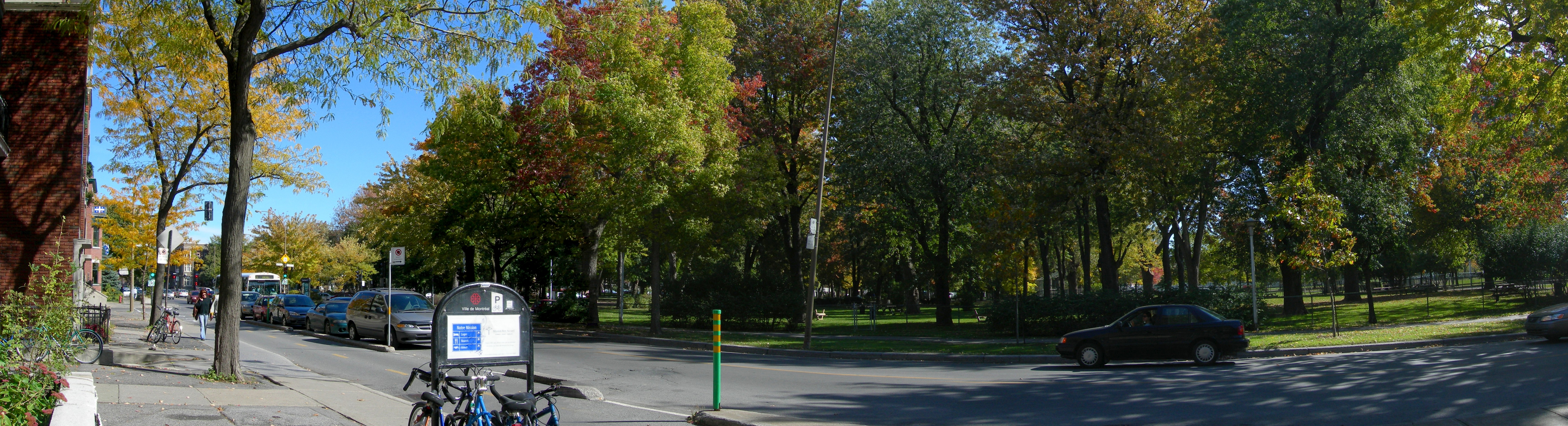 Parc Lafontaine, Nord (rue Rachel). Panorama.